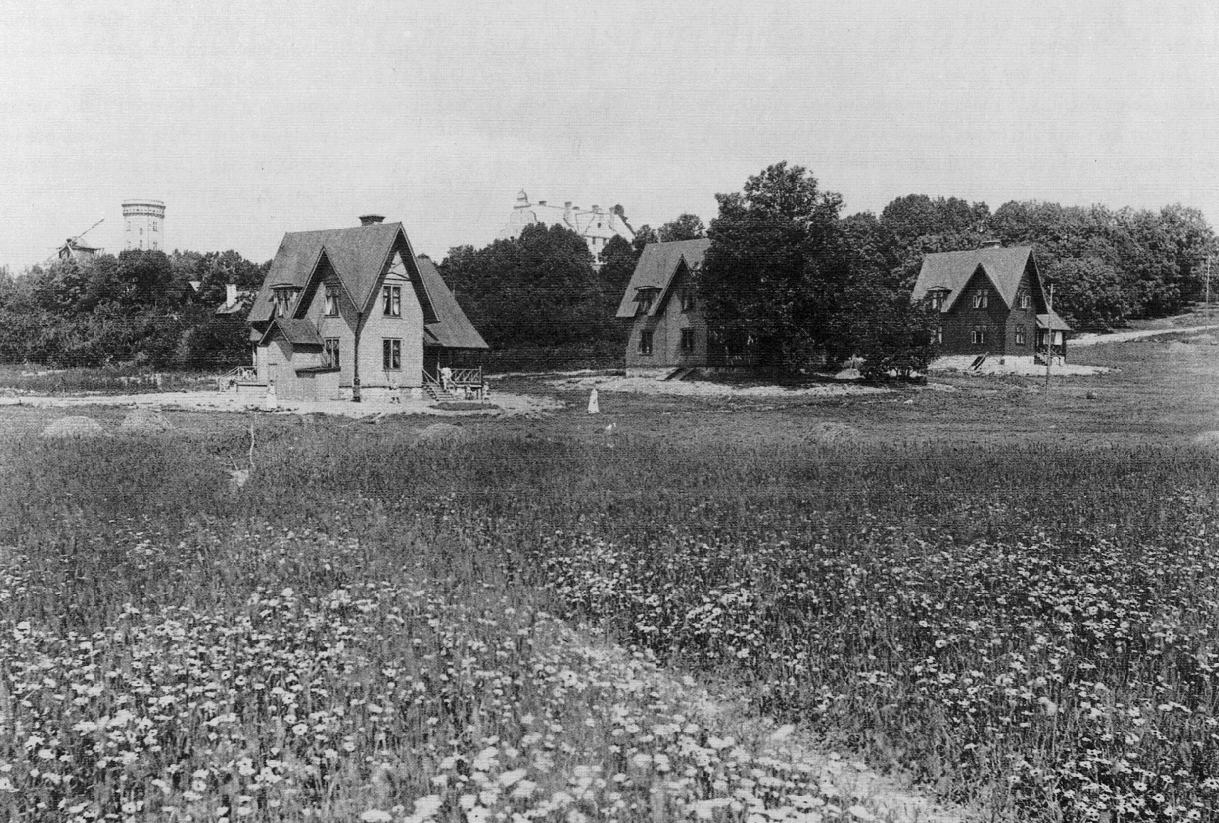 Djursholms vattentorn och gamla kvarnen samt tre av Djursholms första typhus, arkitekt Erik Lundroth. Det mellersta huset finns kvar och ligger vid Germaniavägen 21.